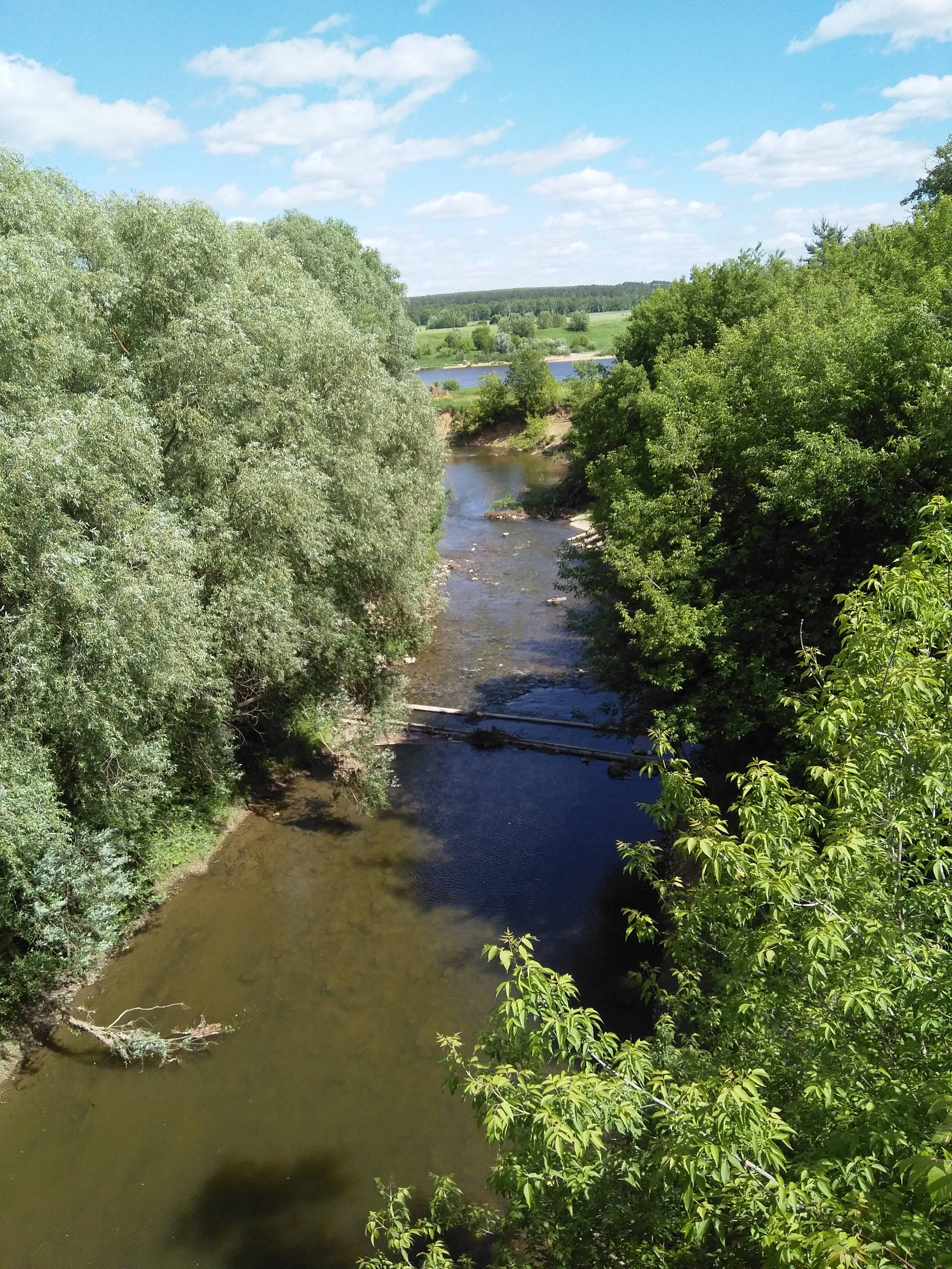 Река Таруска при впадении в Оку. Снято с моста в городе Таруса